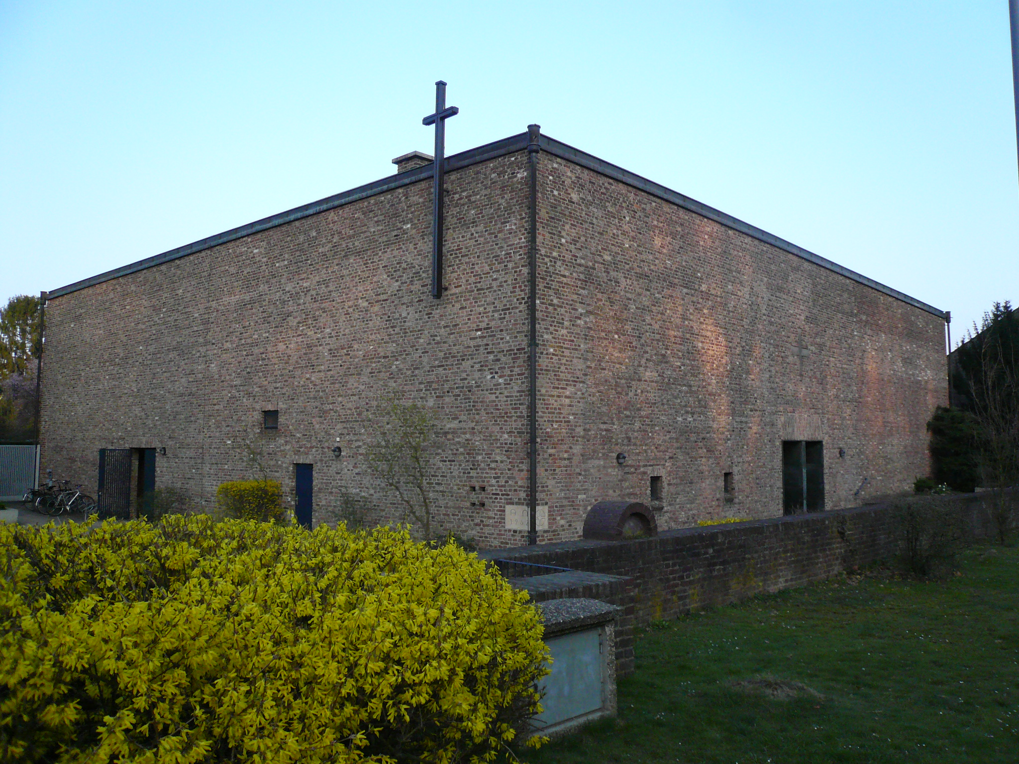 kath. Kirche St. Augustinus Düsseldorf-Eller, In der Elb